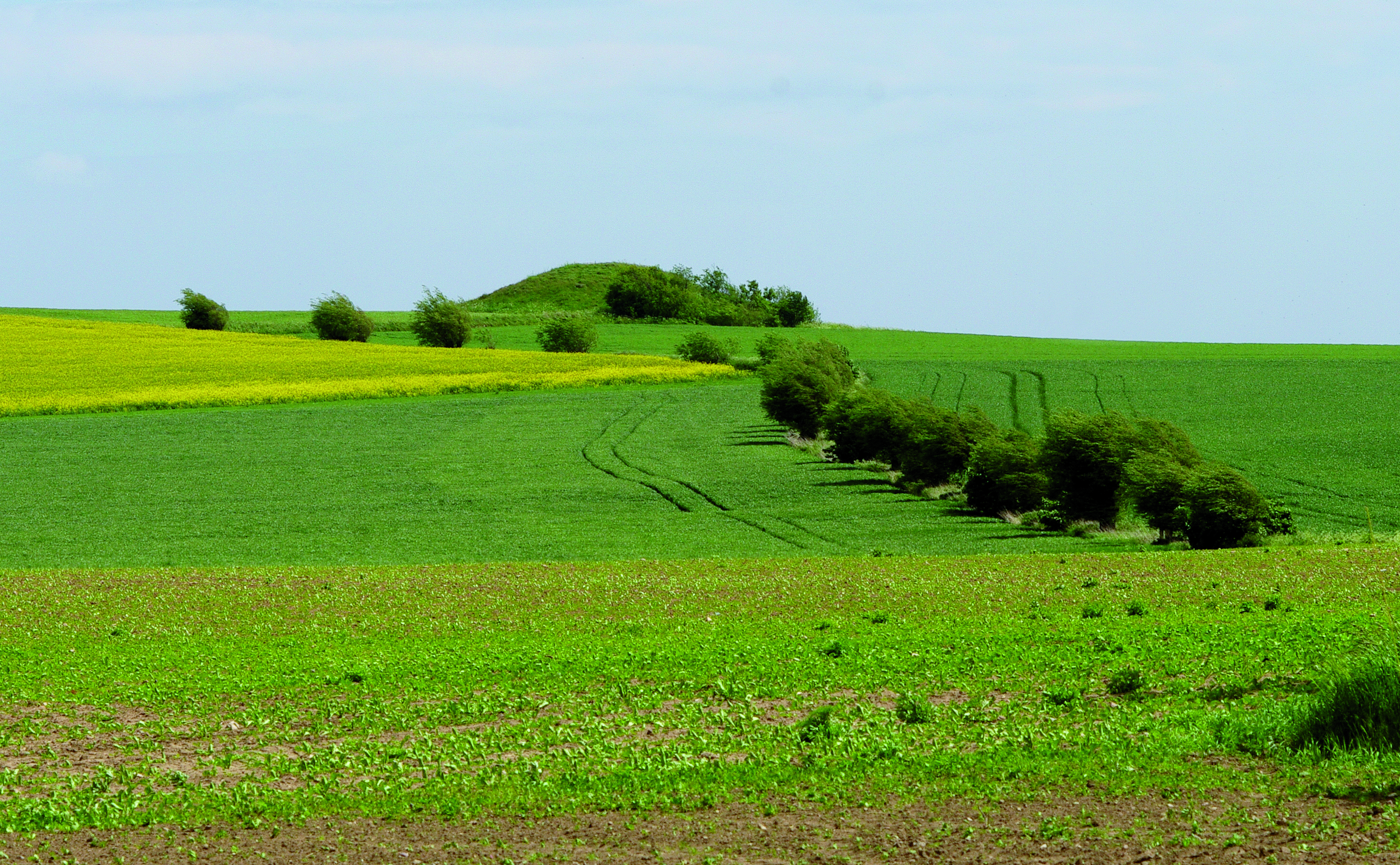 Tullstorps galgbacke i Skåne.